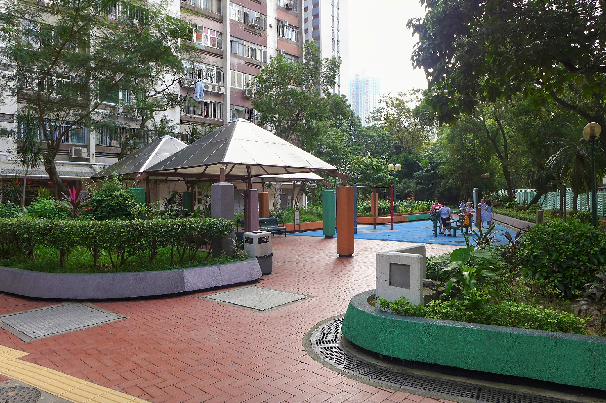 Tung Tau Estate Open space